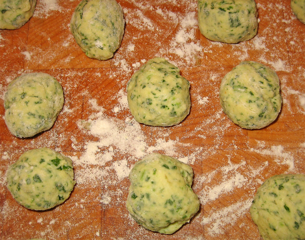 Gnocchi del Casentino before cooking